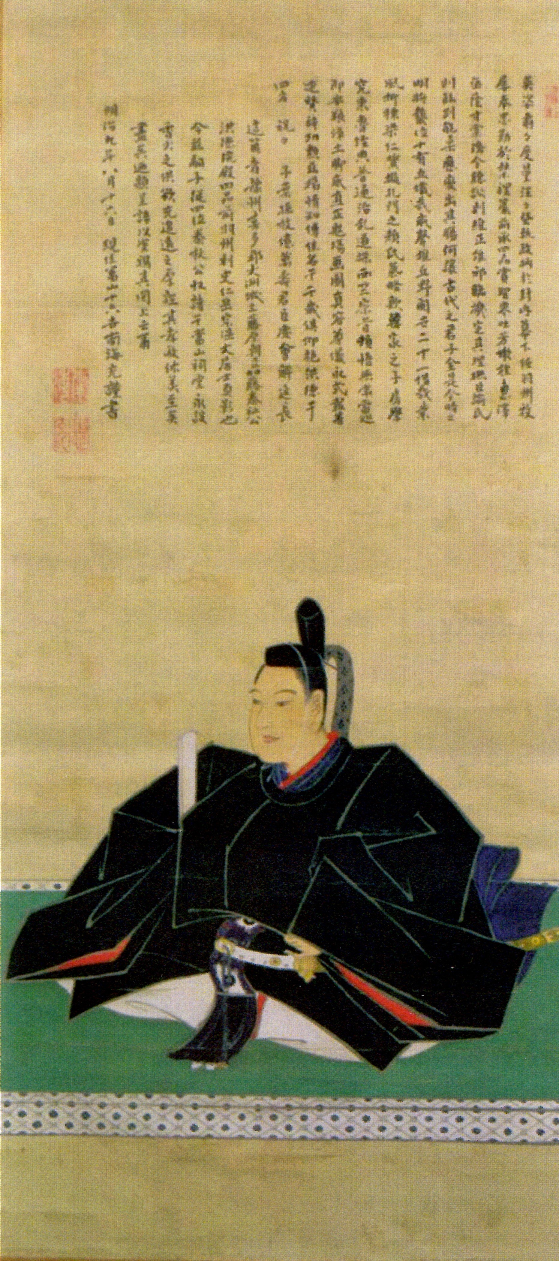 加藤泰祉の肖像。